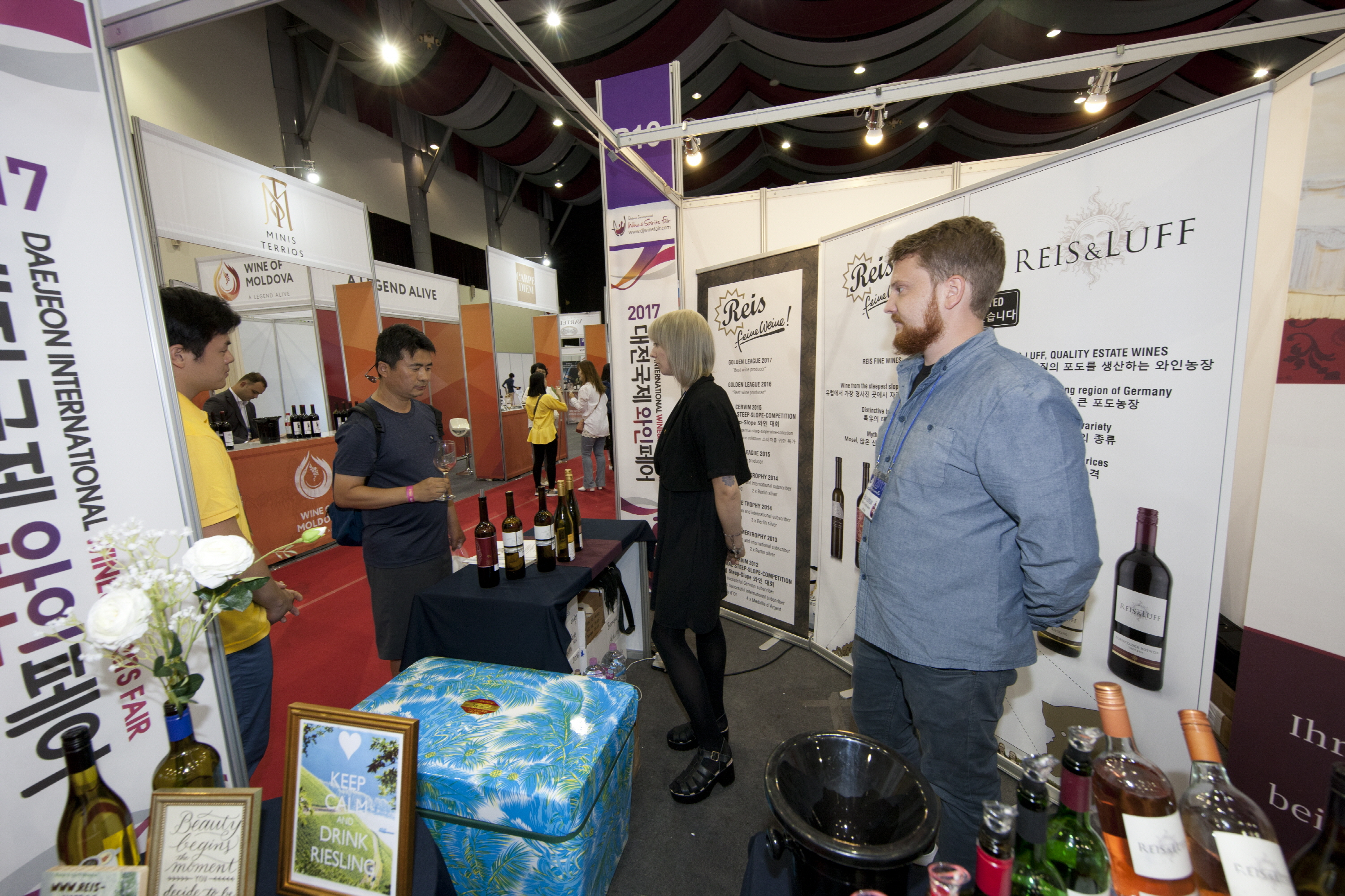 2017 대전국제와인페스티벌 8